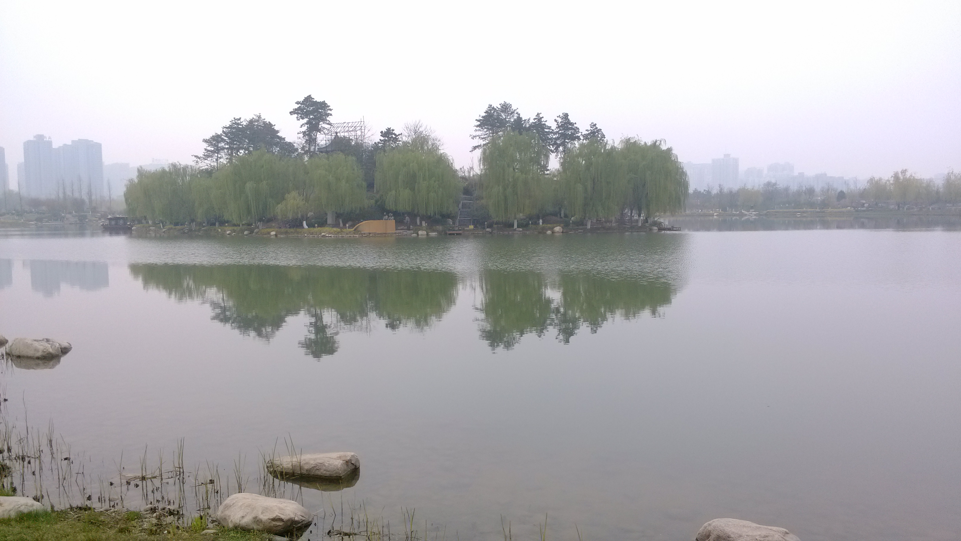 大明宫太液池